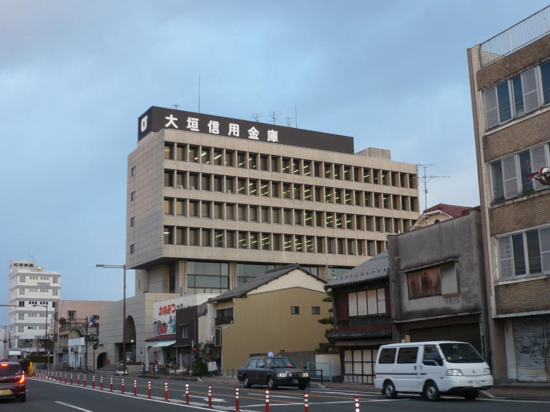 大垣信用金庫本店。